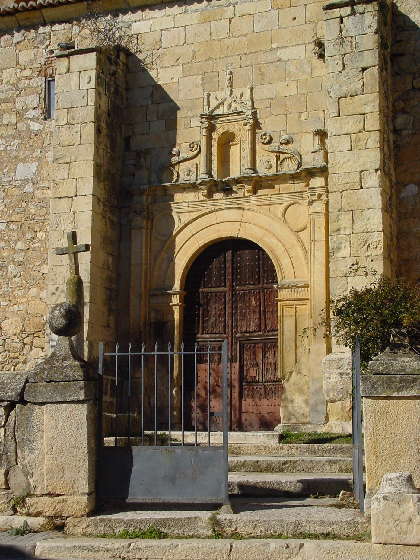 Puerta de iglesia en Redueña.